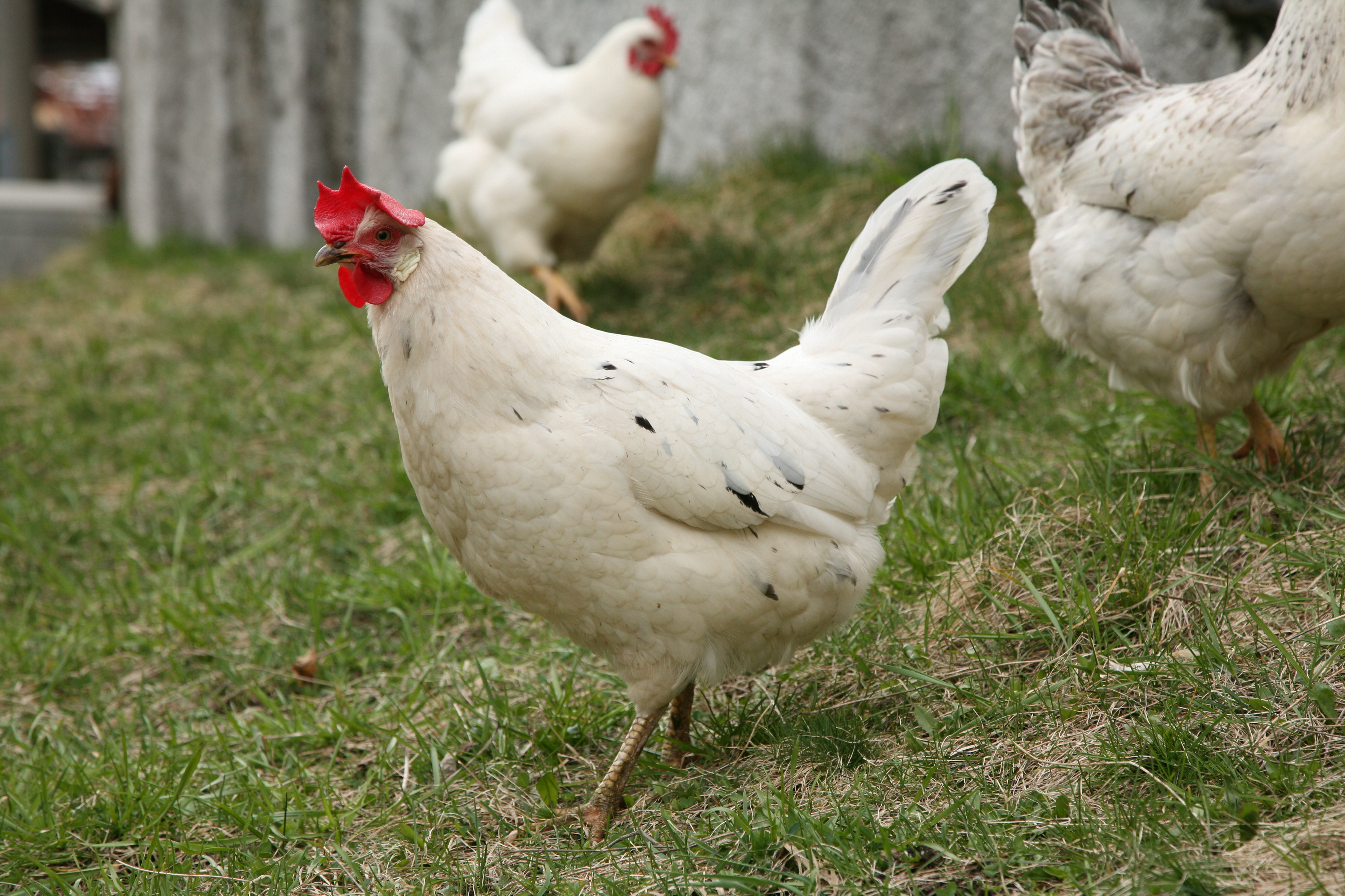 Hen in Coltura, Switzerland